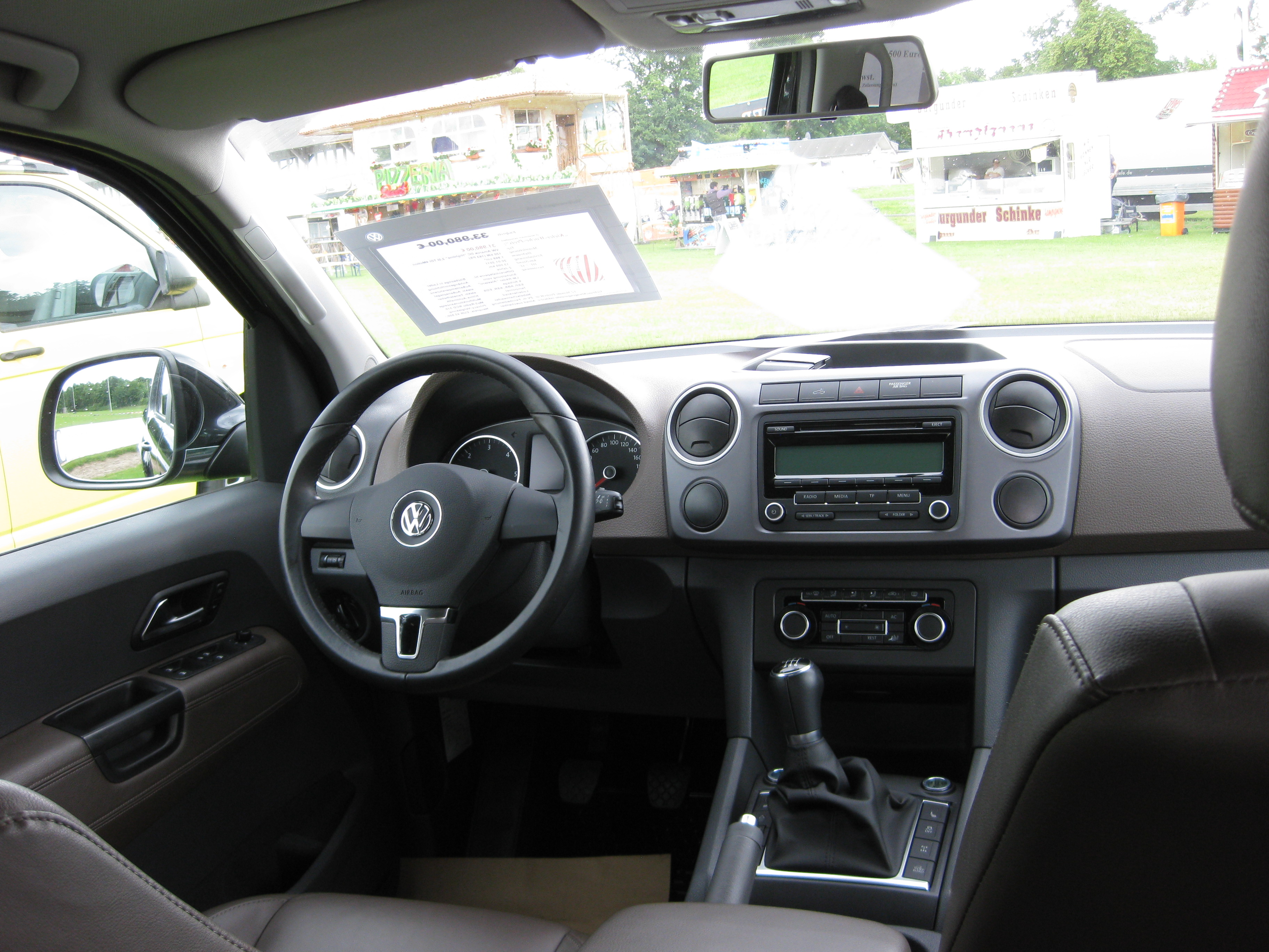 VW Amarok